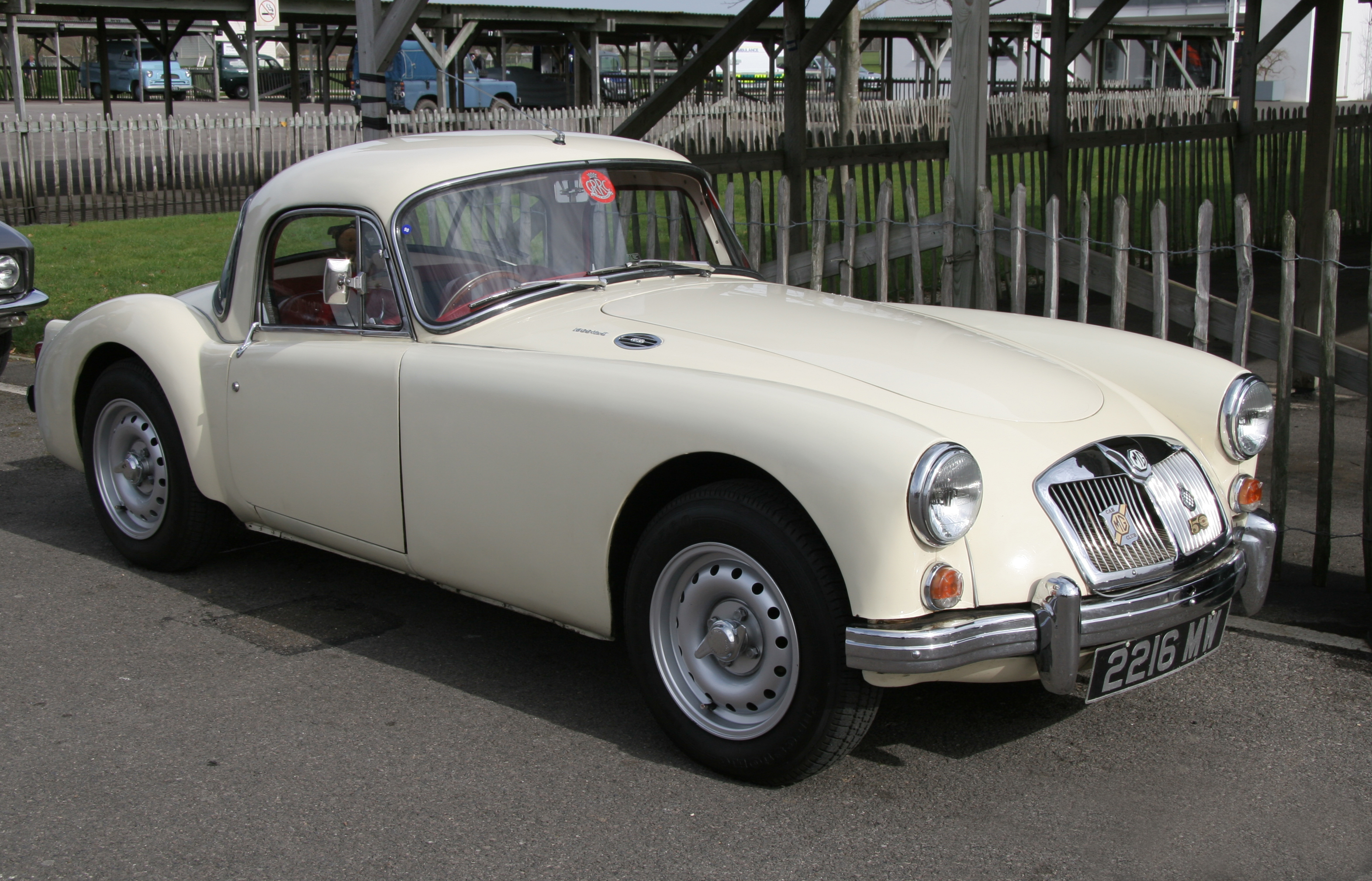 MGA